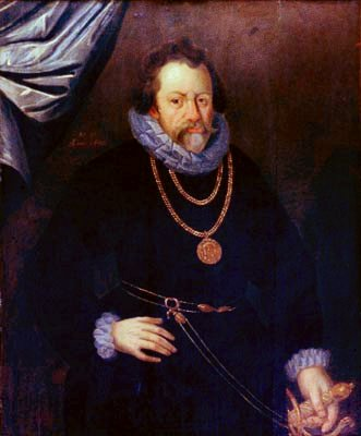 Graf Arnold IV. von Steinfurt (Regent von 1566-1606)